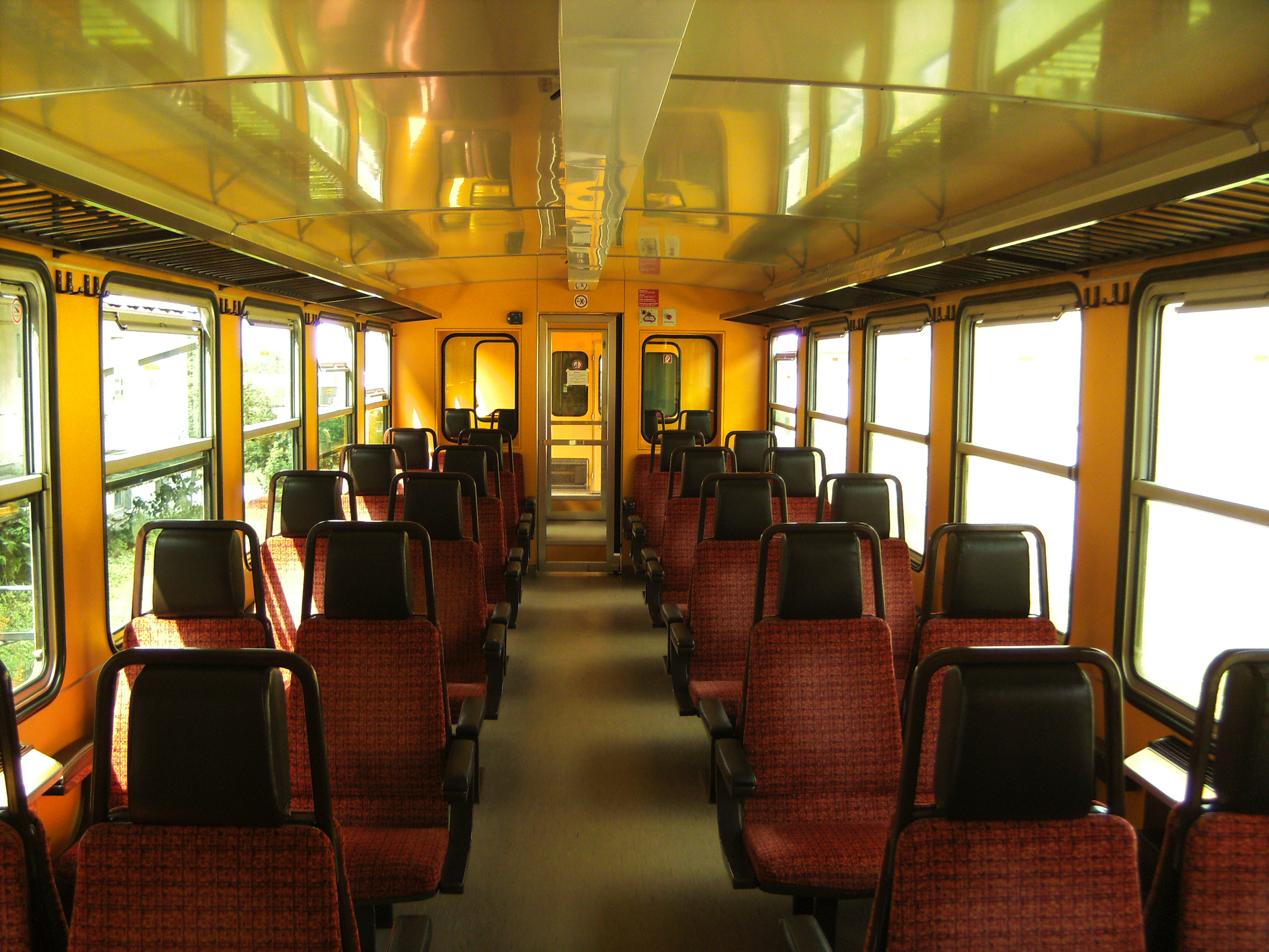 Innenansicht des ET 25.103